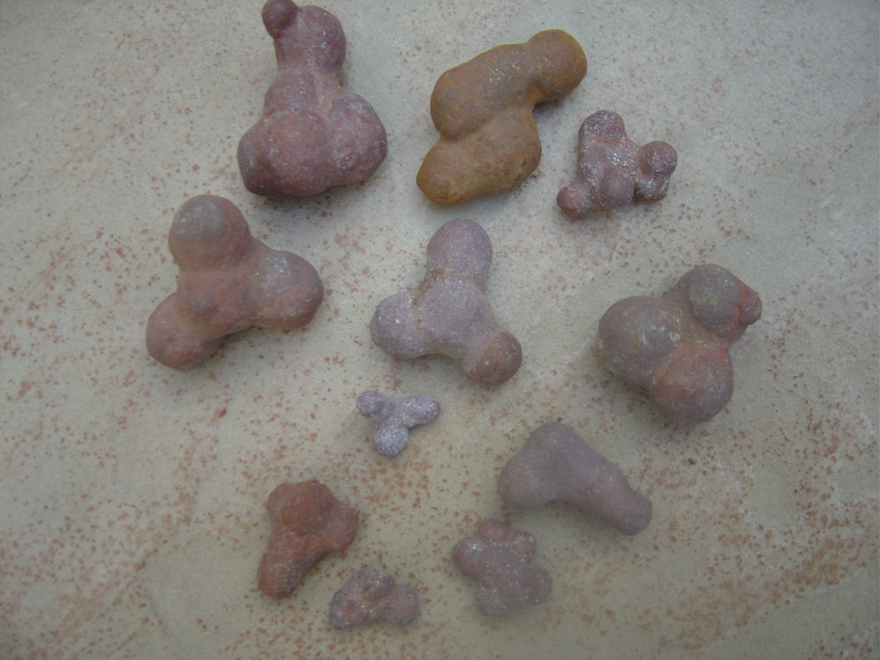 Tétraèdre minéral d'origine magmatique issu du volcan du Diable - Lac Armor à Kerguelen